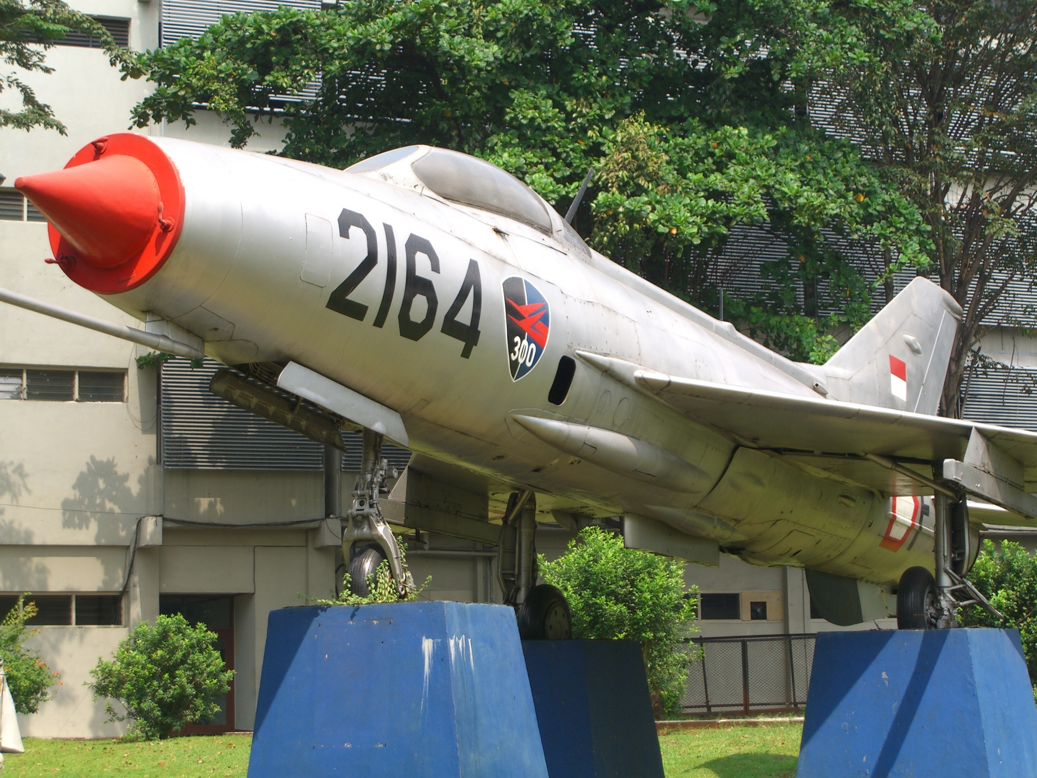 saya, sebagai pembuat foto ini menyatakan foto ini mempunyai lisensi domain umum . Bkusmono 03:10, 13 Juni 2007 (UTC)